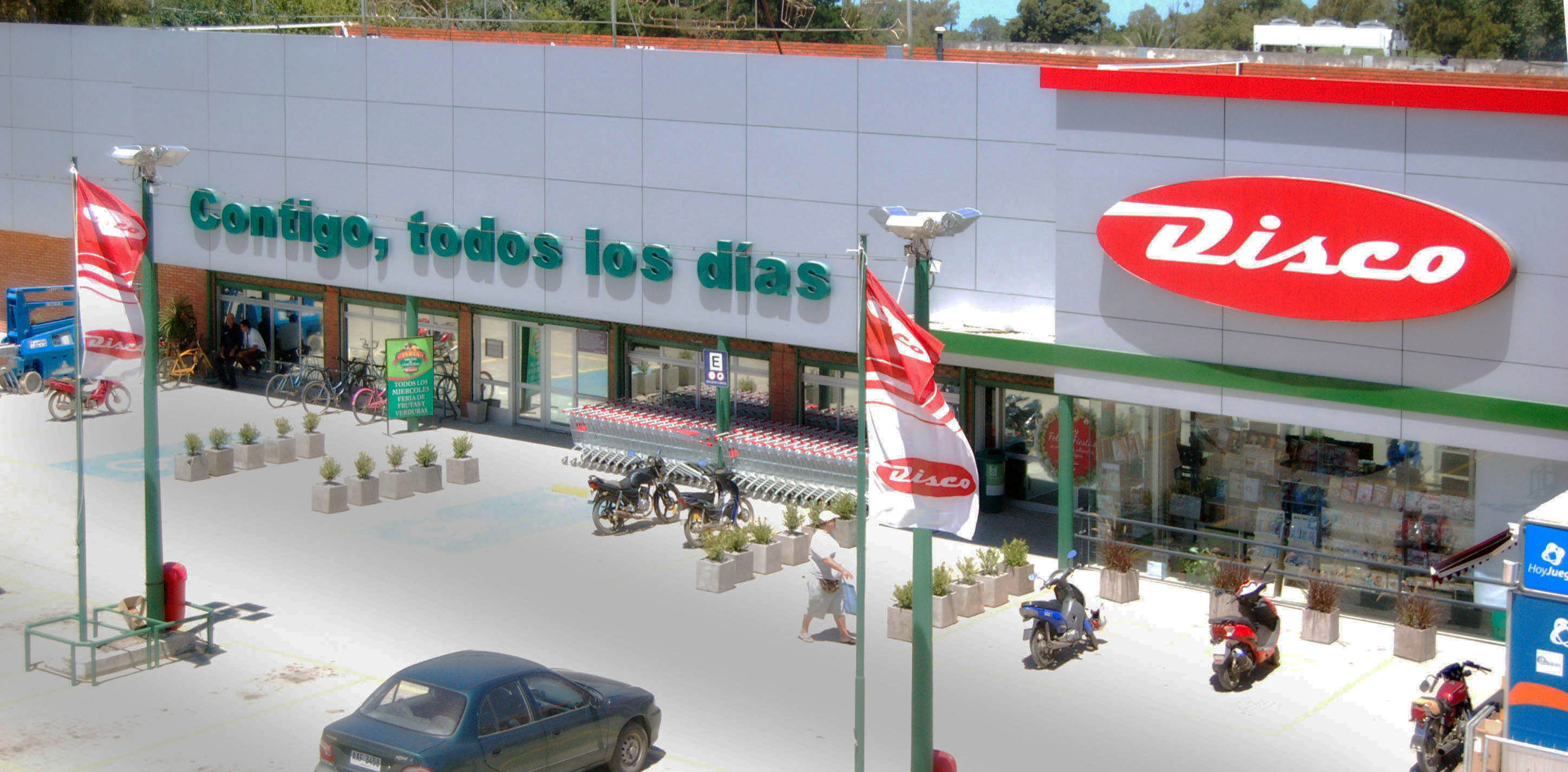 Supermarché Disco en Uruguay